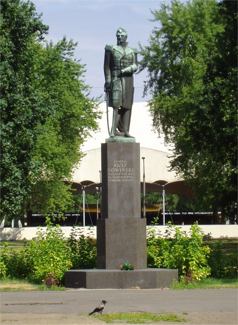 Pomnik generała Józefa Sowińskiego w parku jego imienia na Woli w Warszawie (fot Zu). Pomnik zaprojektowany został przez Tadeusza Breyera.